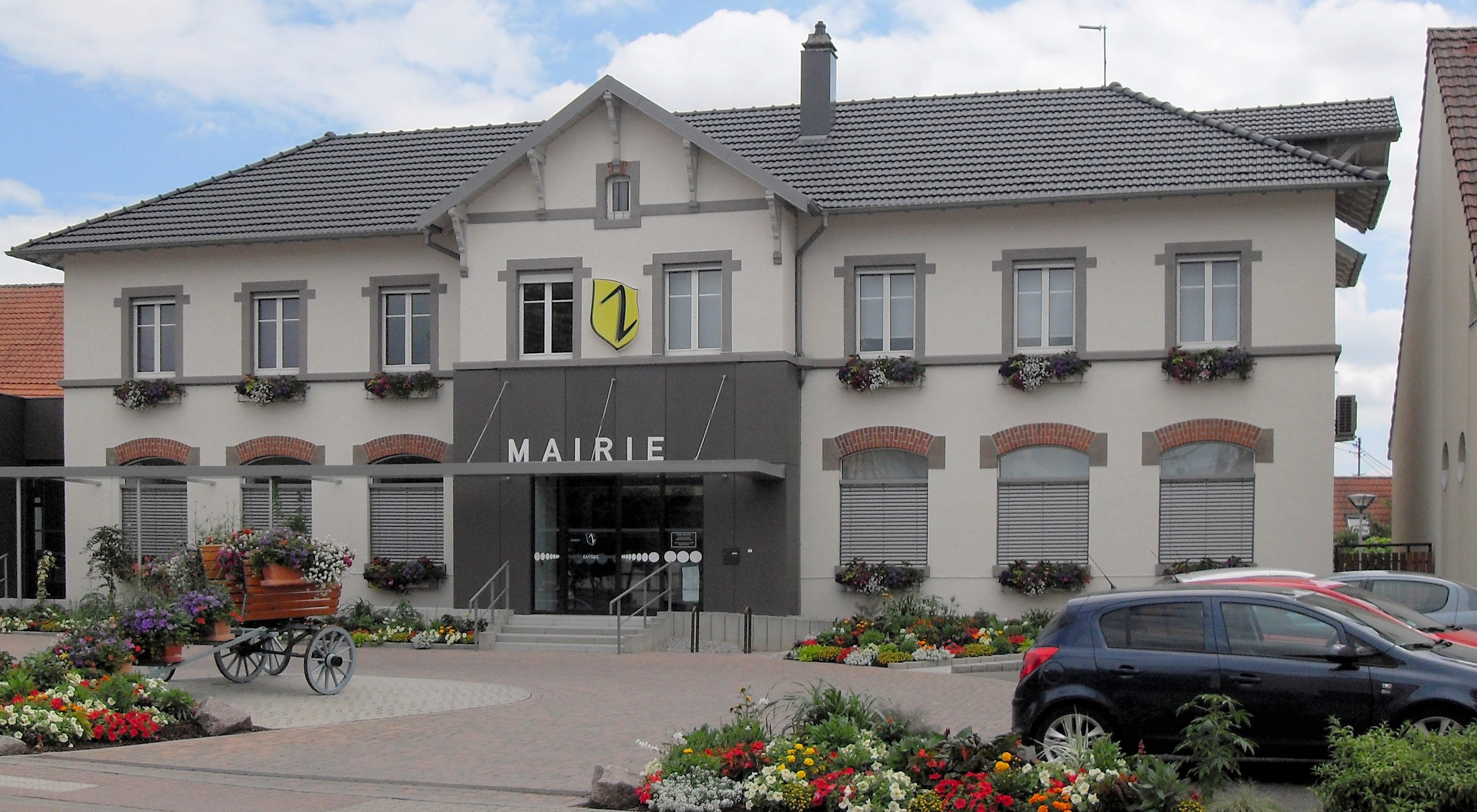 La mairie de Wolfisheim, ancienne école, 19 rue du Moulin